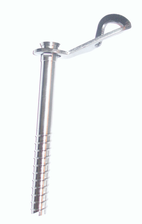 Eisschraube aus Titan, 18cm lang